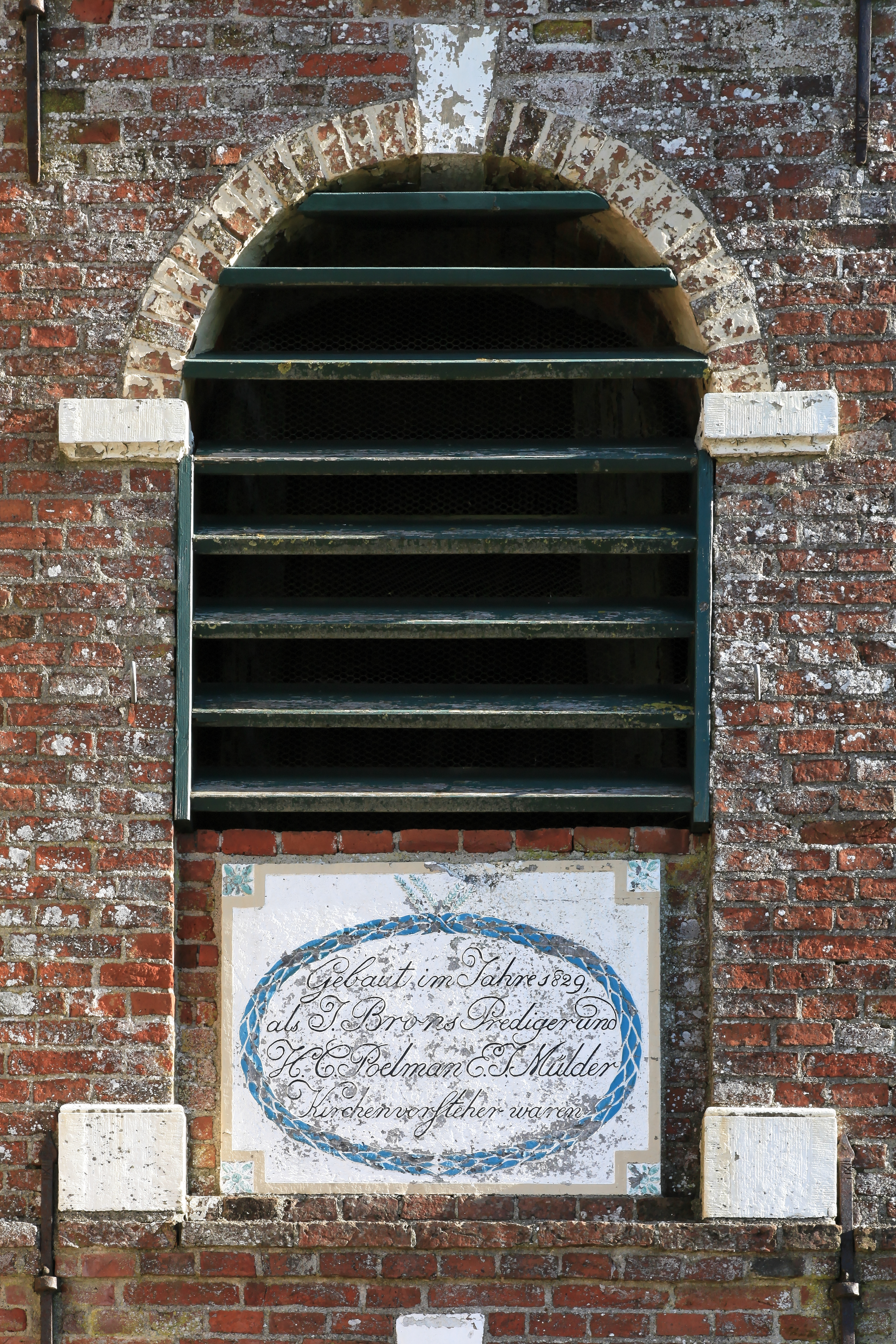 Landschaftspolder Kirche, Landschaftspolder in Bunde (Germany)